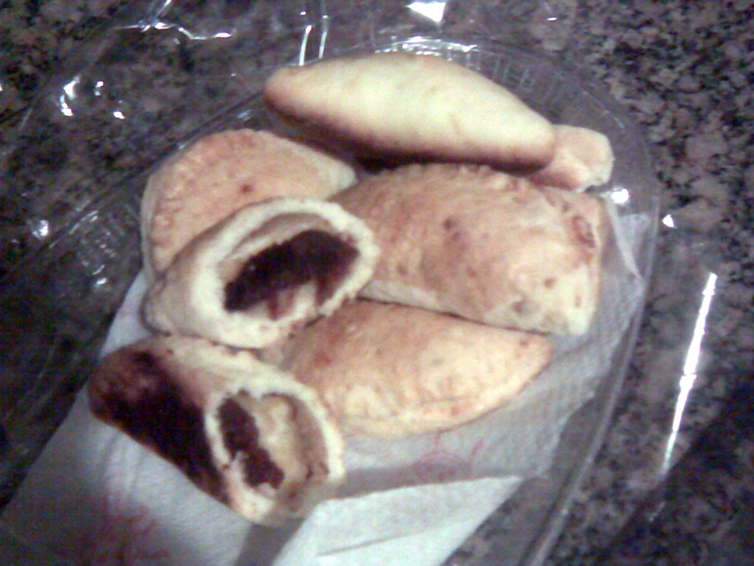 alcune chinulidhre (versione da cellulare)